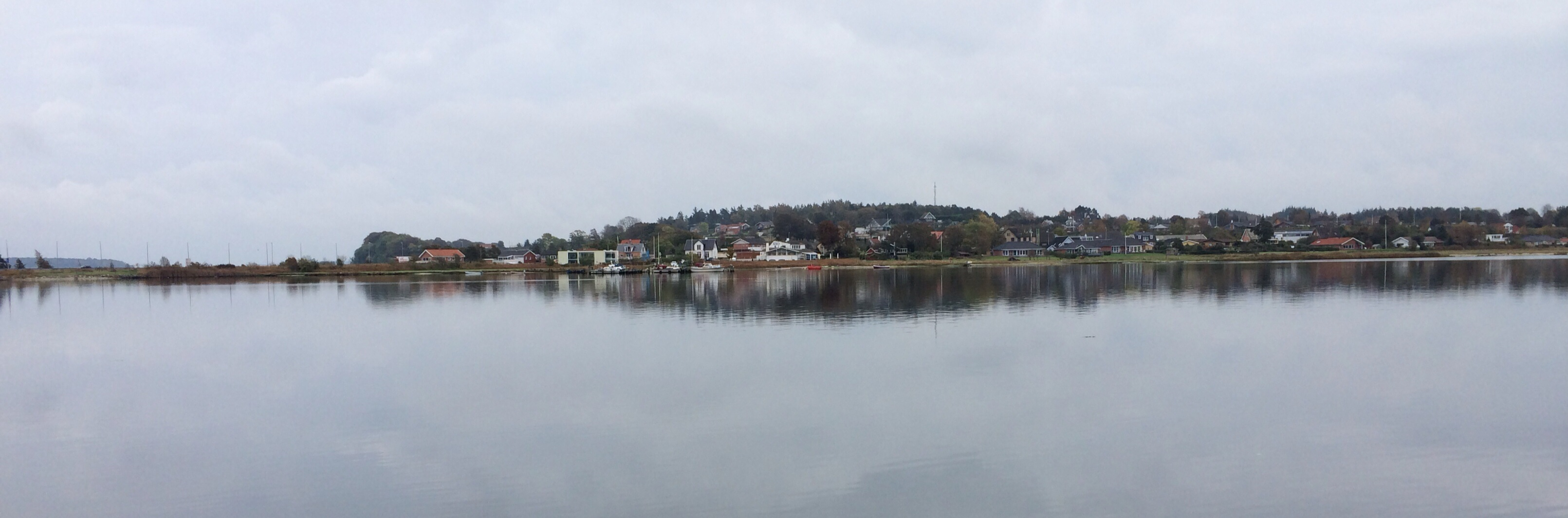 Hadsund syd set fra nord.